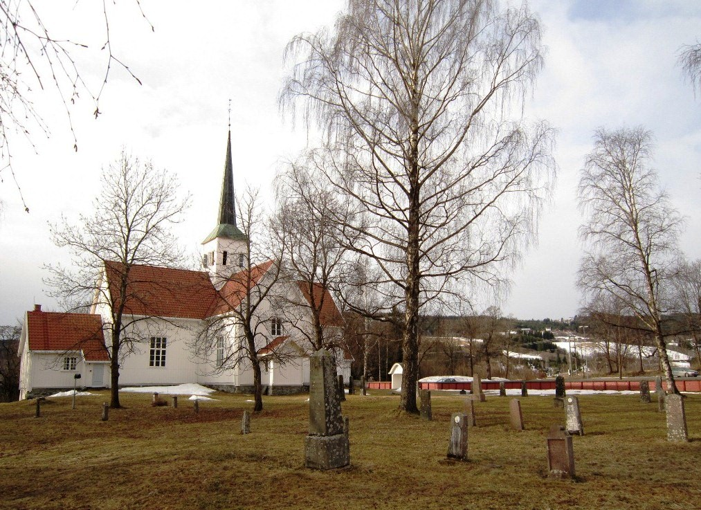 Biri kirke